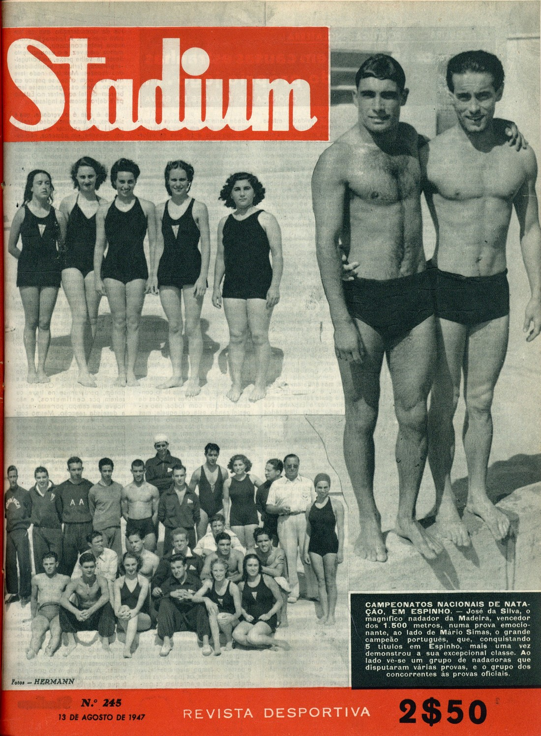 Stadium : revista desportiva S. 2, n.º 245, 13 Ago. 1947